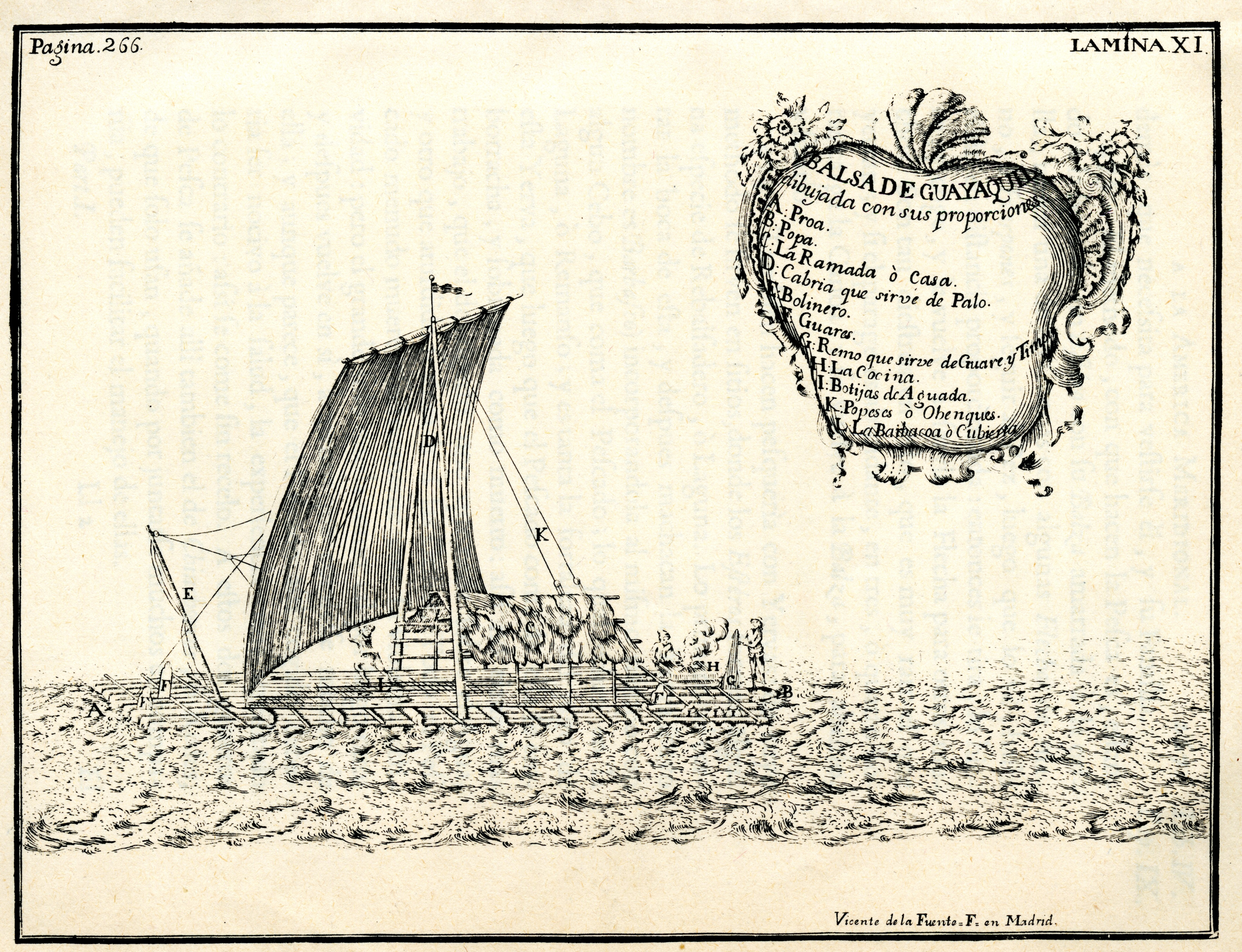 De Ulloa, Antonio y Jorge Juan. Relación Histórica del Viaje a la América Meridional, hecho de Orden de Su Majestad Católica para medir algunos Grados de Meridiano Terrestre, y venir por ellos en conocimiento de la verdadera Figura y Magnitud de la Tierra, con otras varias Observaciones Astronómicas y Físicas. Por Don Jorge Juan Comendador de Aliaga, en la Orden de San Juan, Socio correspondiente de la Real Academia de las Ciencias de París; y Don Antonio de Ulloa de la Real Sociedad de Londres: ambos por Capitanes de Fragata de la Real Armada. Primera Parte / Tomo I. Impresa por la Orden del Rey Nuestro Señor en Madrid por Antonio Marín, Año de MCDDXLVIII (1748). Diapositiva de Consulta y acceso publico cuya información fue investigada de un libro y/o ejemplar de revisión custodiado en los Fondos Bibliográficos (Sección Siglo XVIII o Etapa Colonial) del Archivo Histórico del Guayas; Guayaquil, Ecuador.Consultado y compartido por el usuario Jodison Javier García Alcivar.